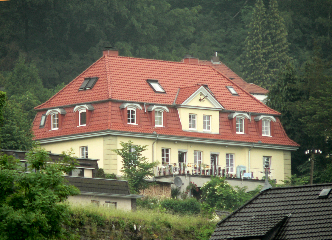 Früheres Haus der Studentenverbindung Mündener Gesellschaft Tanne, aufgenommen von der Alten Werrabrücke